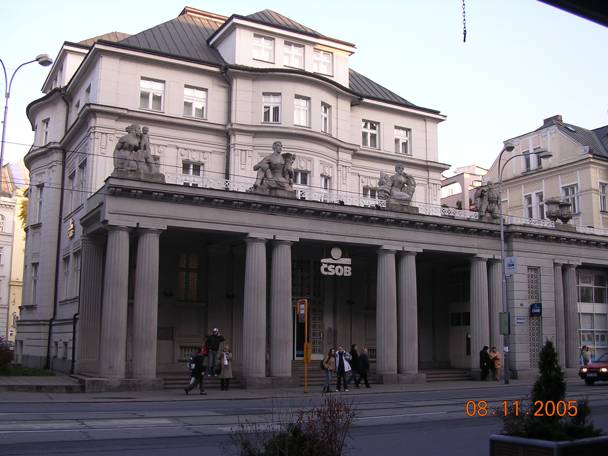 Banka